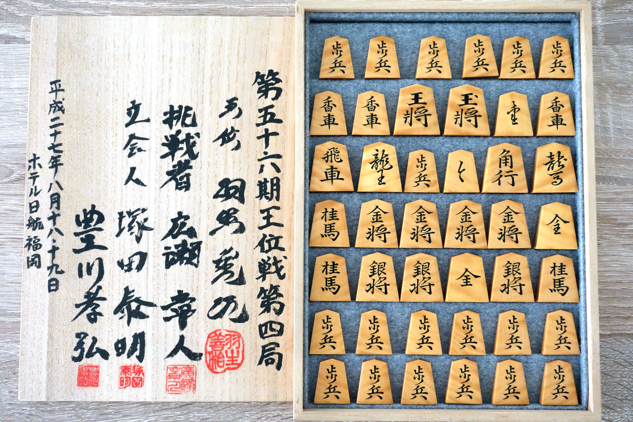 Jeu de Shogi utilisé lors de la quatrième partie de la finale du 56è Oi sen entre Habu Yoshiharu, tenant du titre, et Hirose Akihito. Ce match s'est tenu à Fukuoka les 18 et 19 Août 2015. Ces pièces de shogi ont été fabriquées par Ruiji Kodama. Sur le couvercle, l'inscription indique: "Hotel Nikko Fukuoka Eisei 27 Août 18 + 19 Témoins Toyokawa & Tsukada Challenger Hirose Akihito Oi Habu Yoshiharu 56è Oi sen 4è partie"